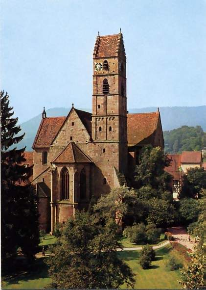 Klosterkirche Alpirsbach